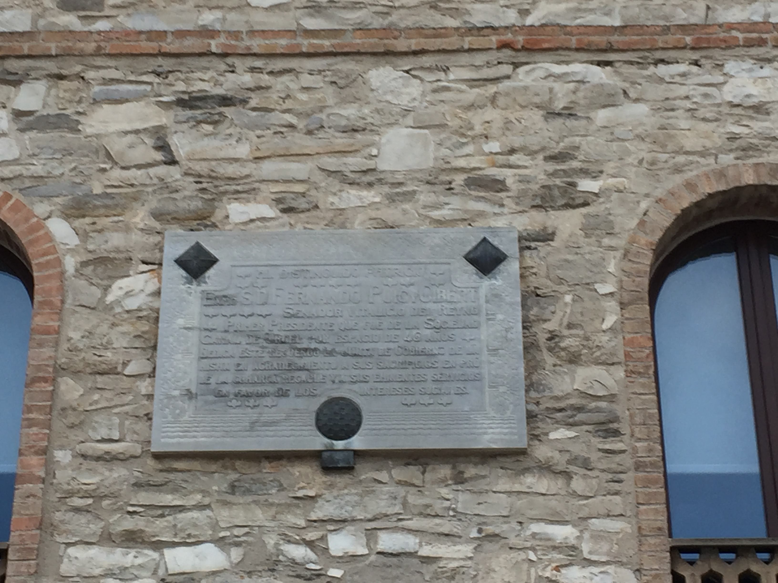 Placa commemorativa a Ferran Puig i Gibert col·locada per la Junta de Govern de la SA Canal de Urgel a la façana de la Casa Canal el 1901.